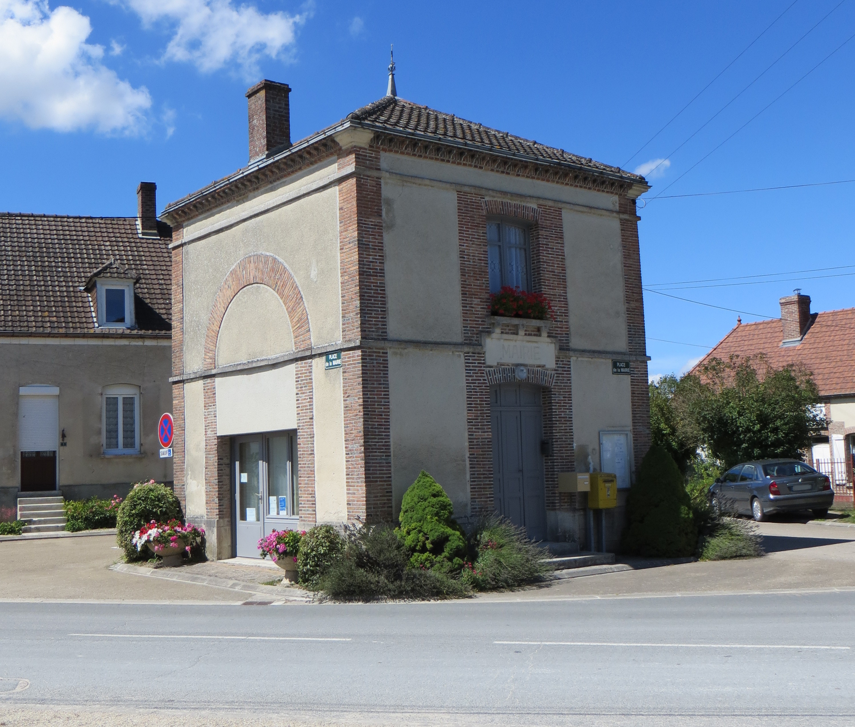 Mairie du village